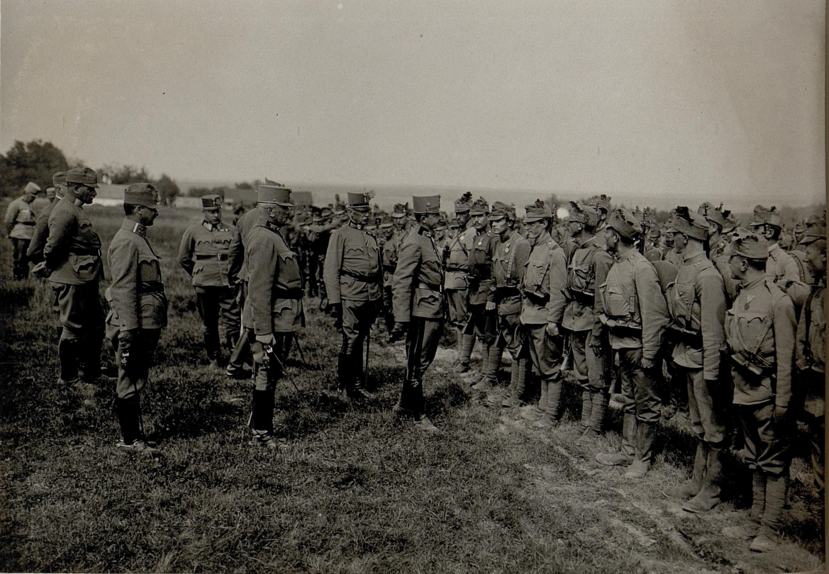 Erzherzog Karl war von Juni 1916 an, Oberkommandierender eines Teilabschnittes der Ostfront und befehligte mehrere Armeen zwischen Brody und den Karpaten. Im Rahmen dieses Kommandos inspizierte Erzherzog Karl seine ihm zugeordneten Einheiten.